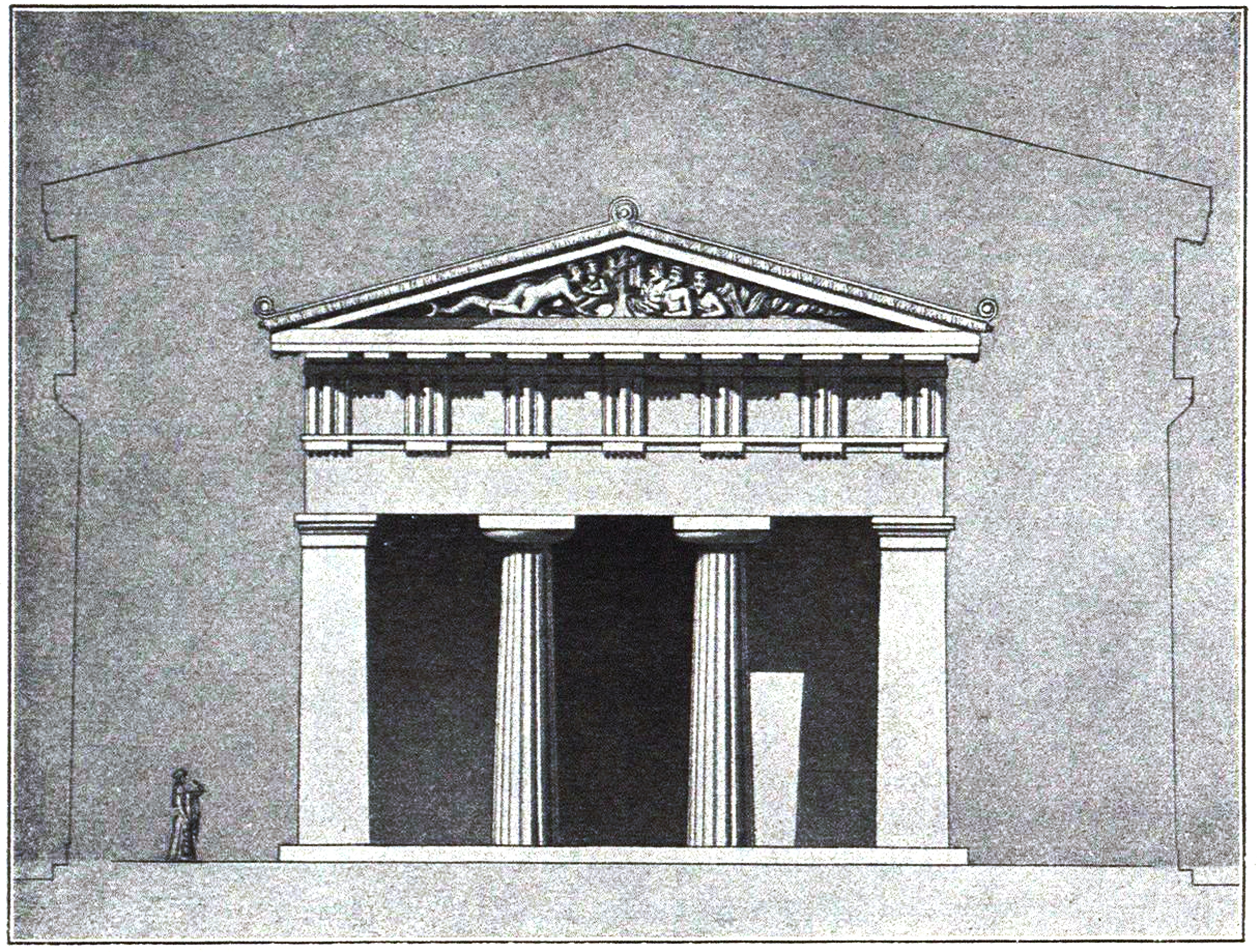 Aufriß des Hekatompedon mit Andeutung der spateren Erweiterung